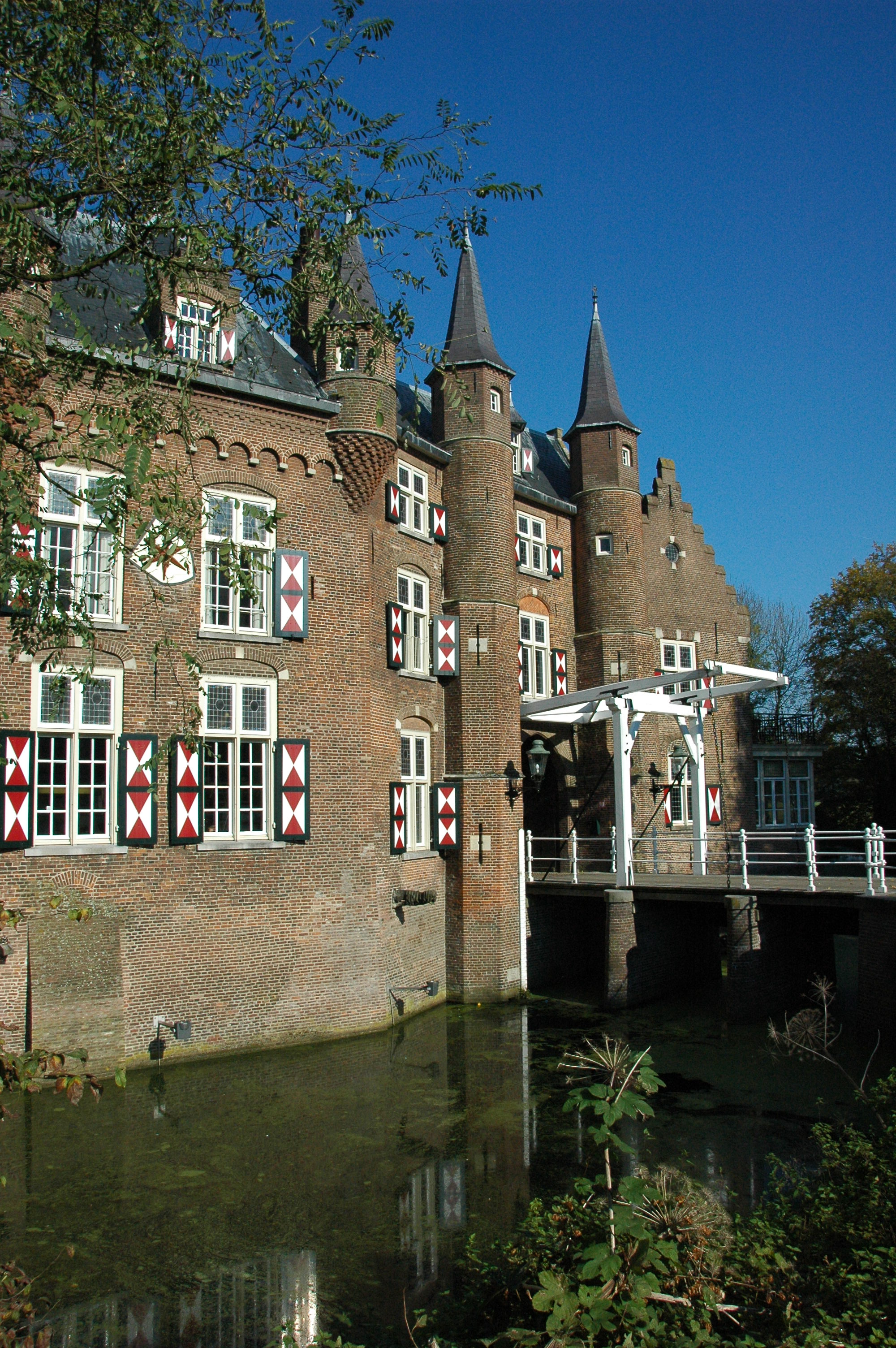 Kasteel Maurick, Vught